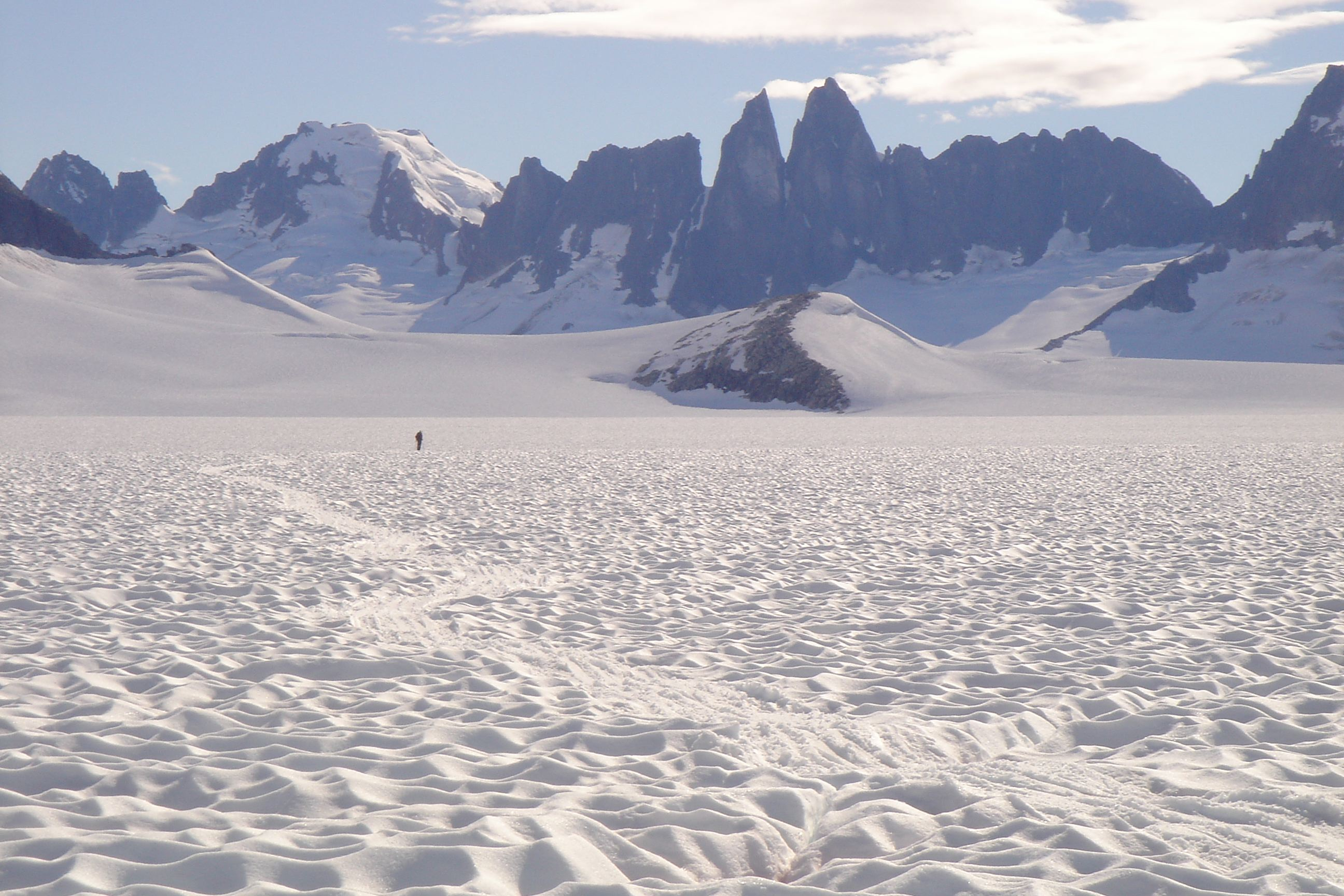 Taku Glacier view